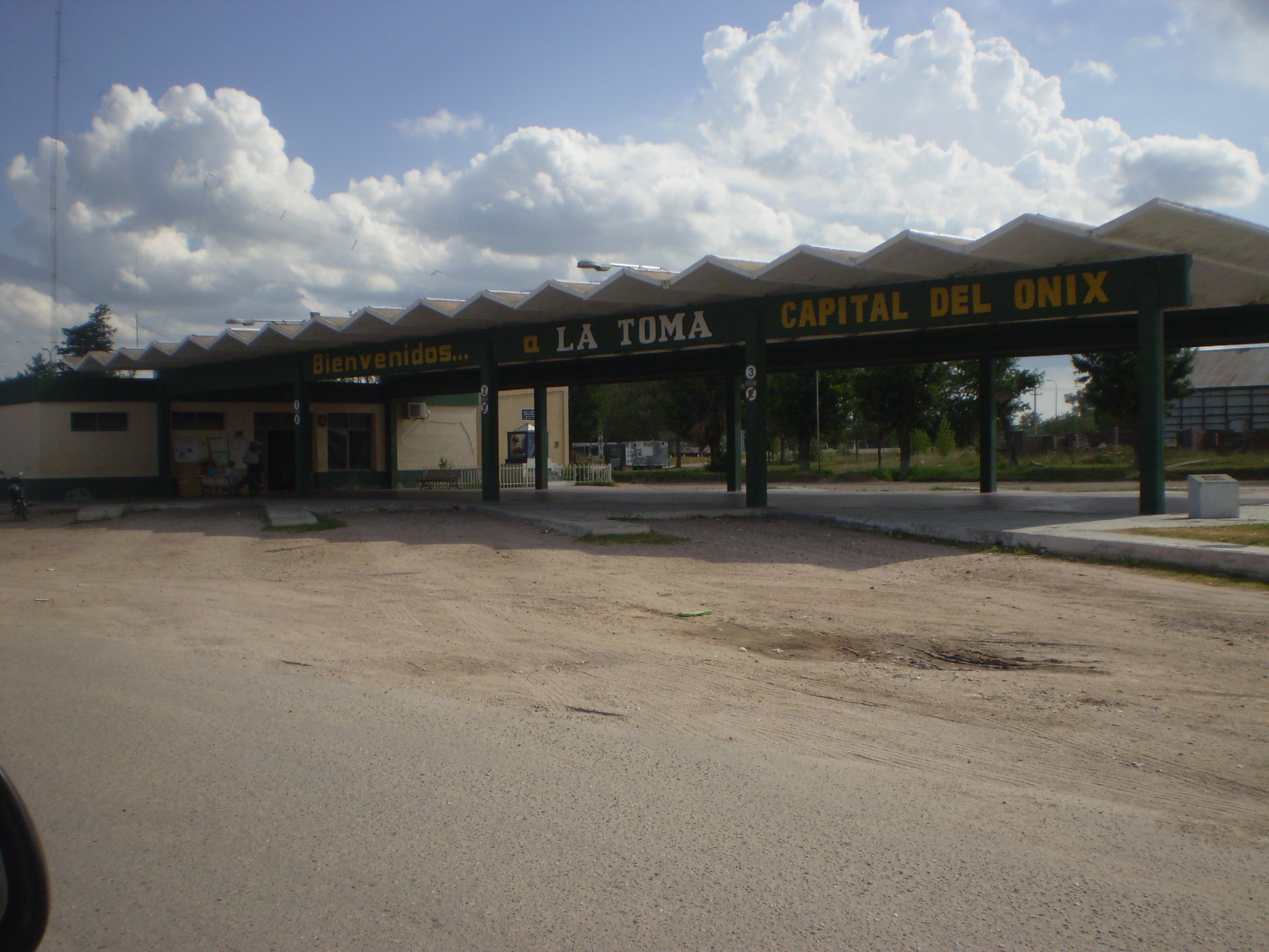 La Toma, San Luis, Argentina, terminal de omnibus.